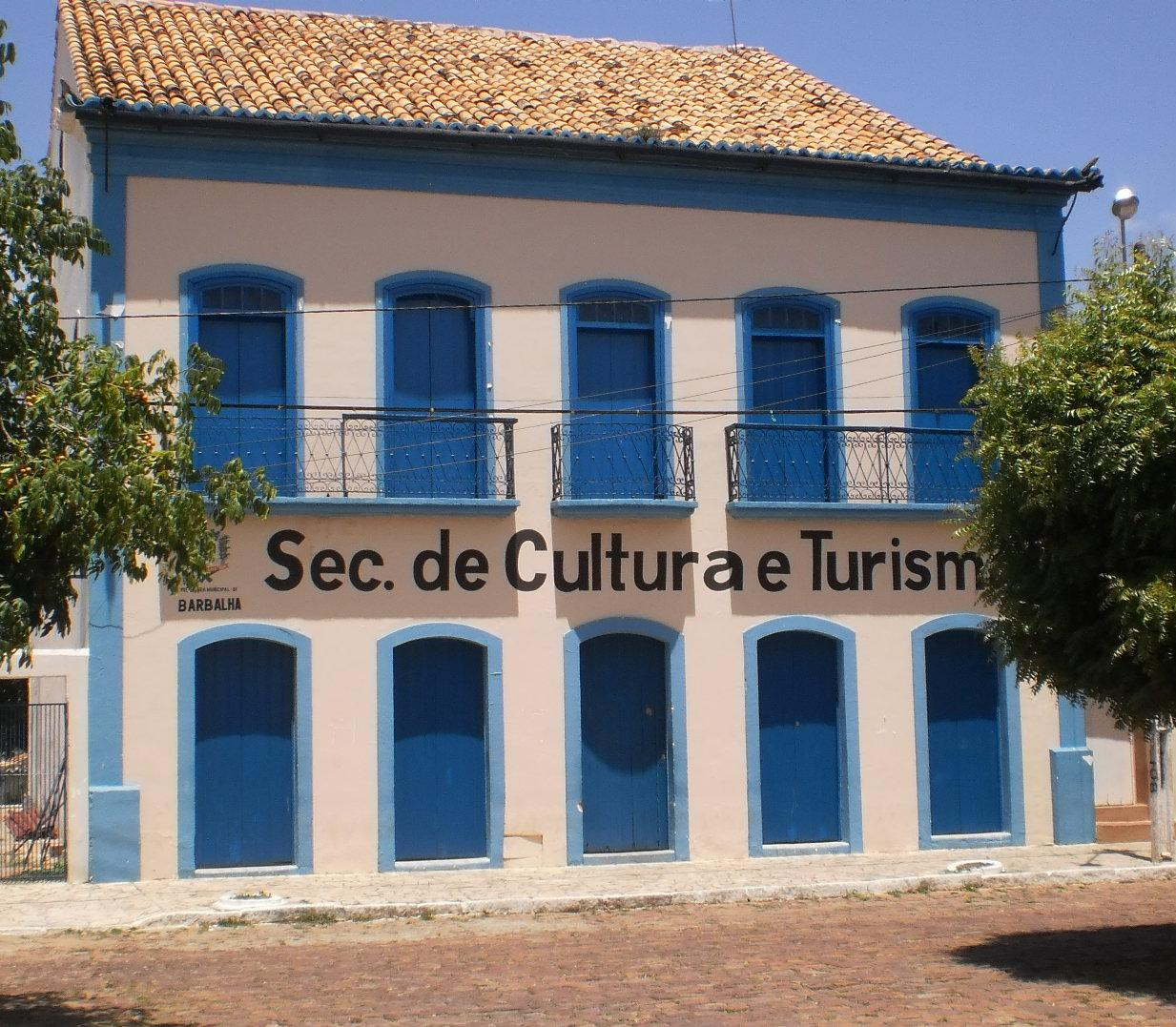 Prédio do centro histórico de Barbalha (Casarão Hotel)